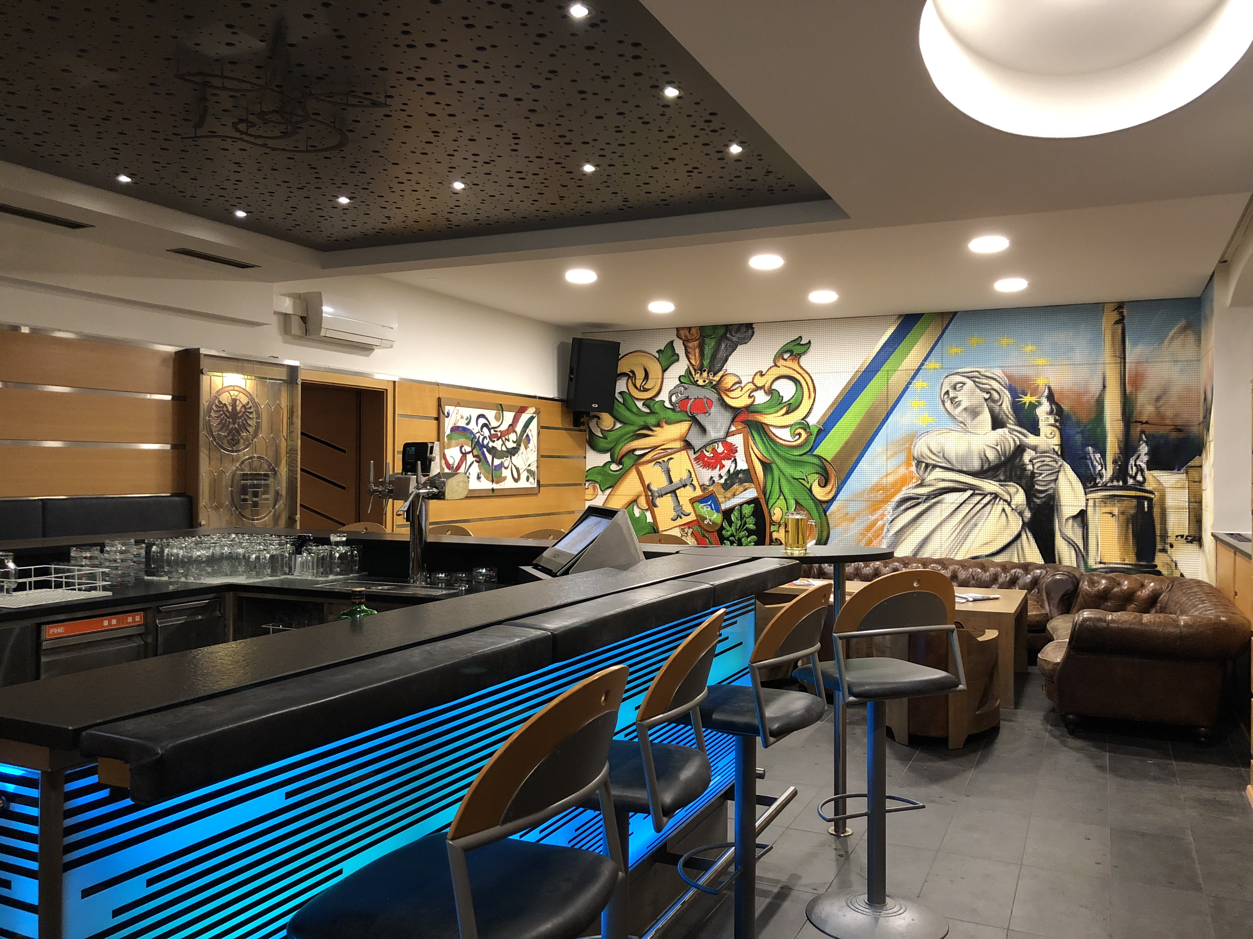 Barraum der KÖHV Leopoldina nach der Sanierung Herbst 2017